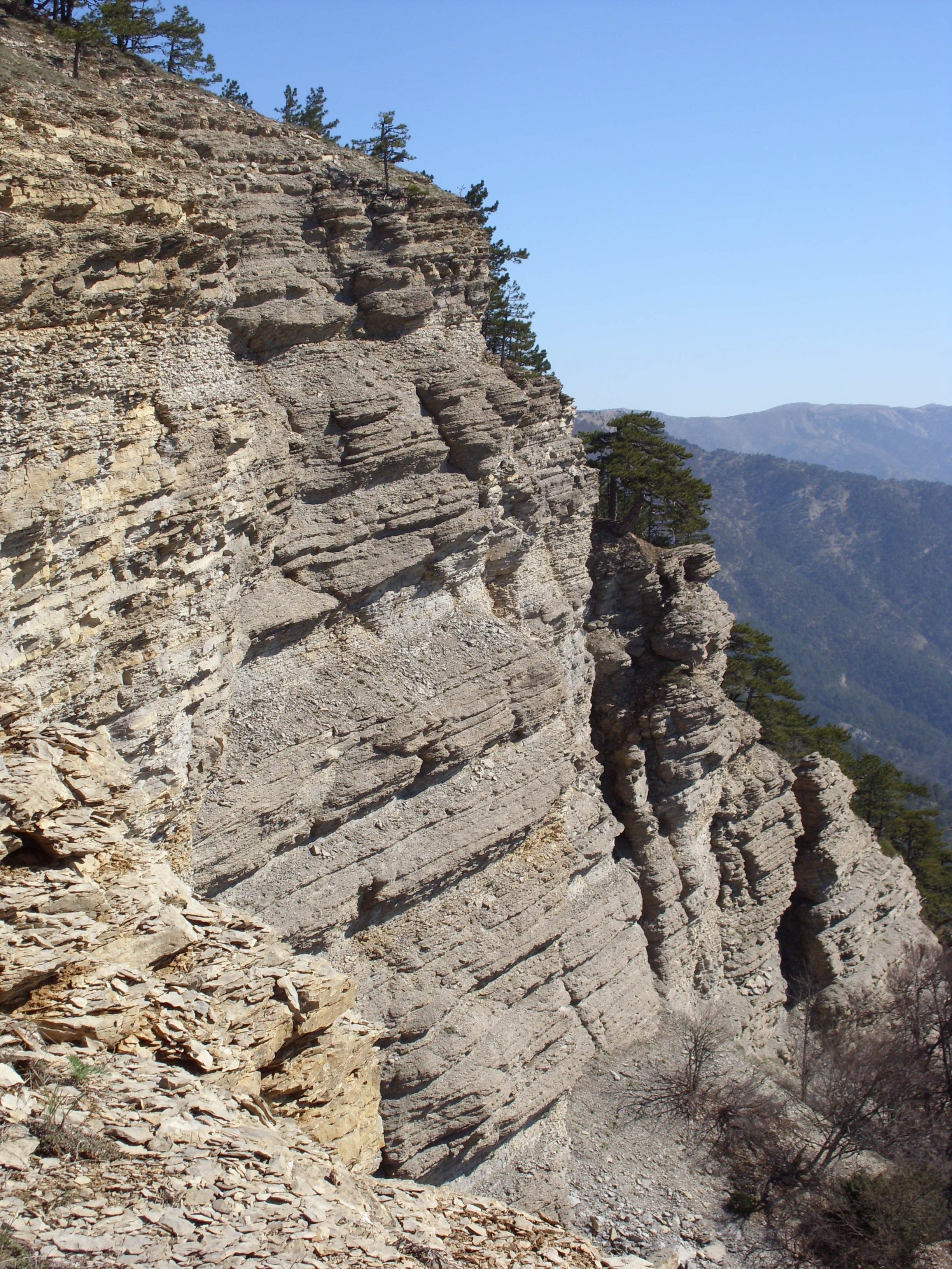 Осадові породи. Ялтинска яйла